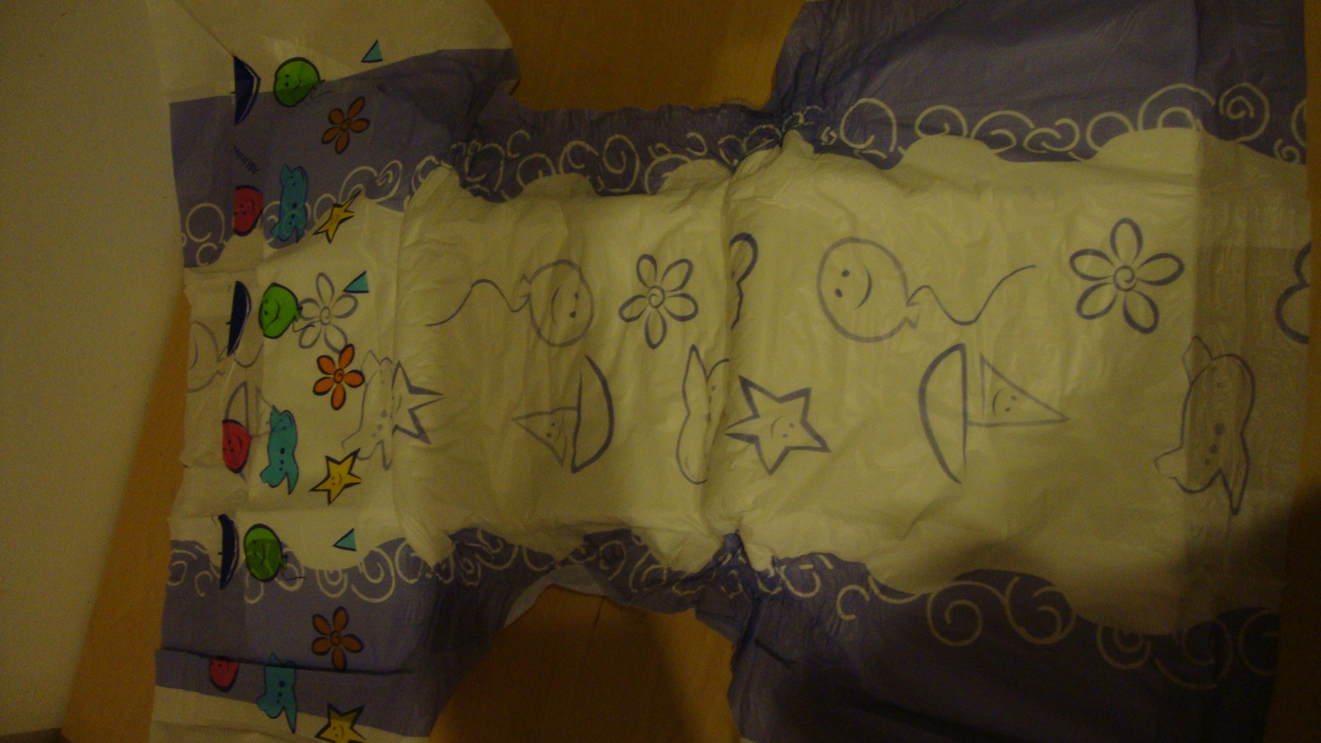 Infantiliste Luier